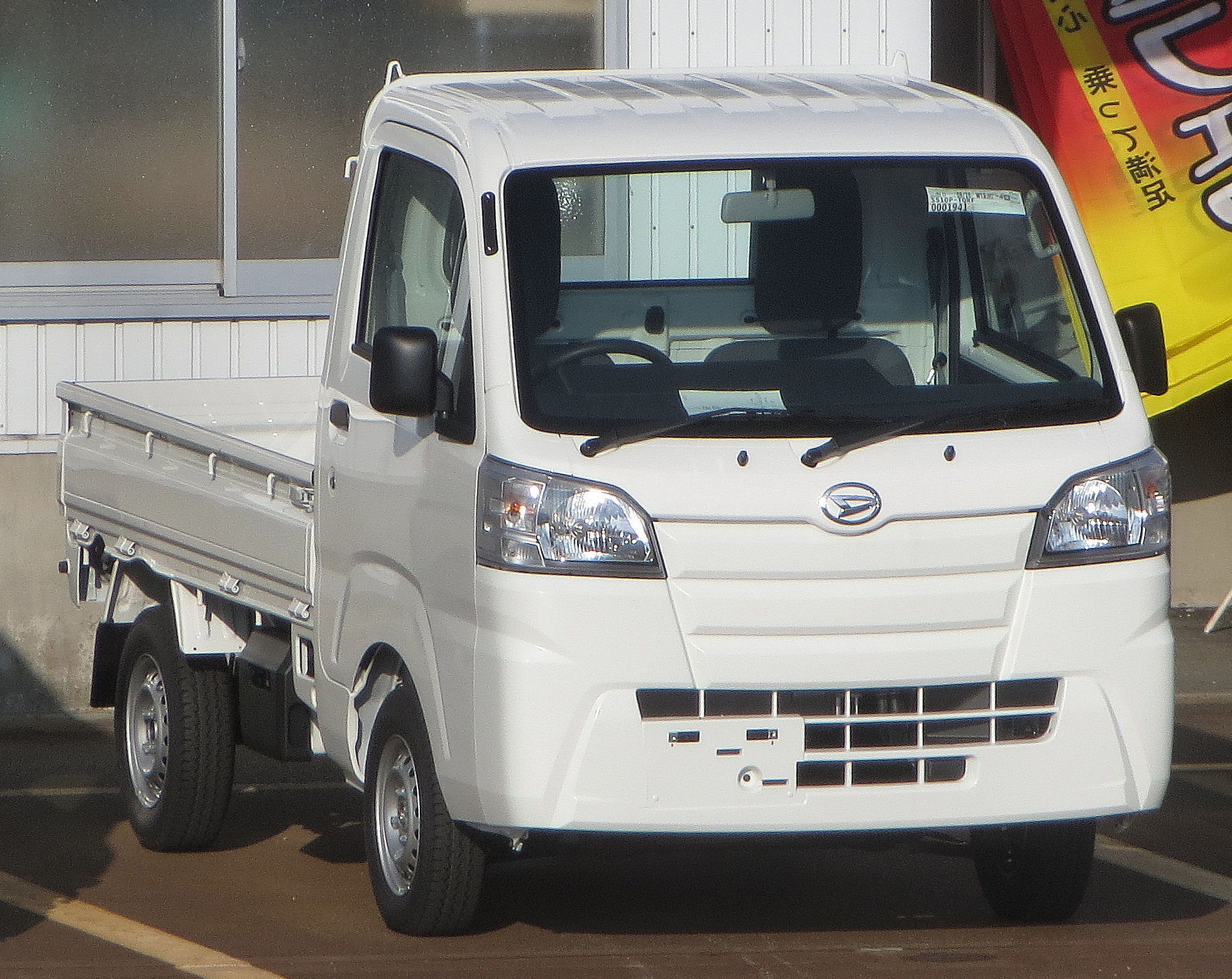 ダイハツ ハイゼットトラック スタンダード